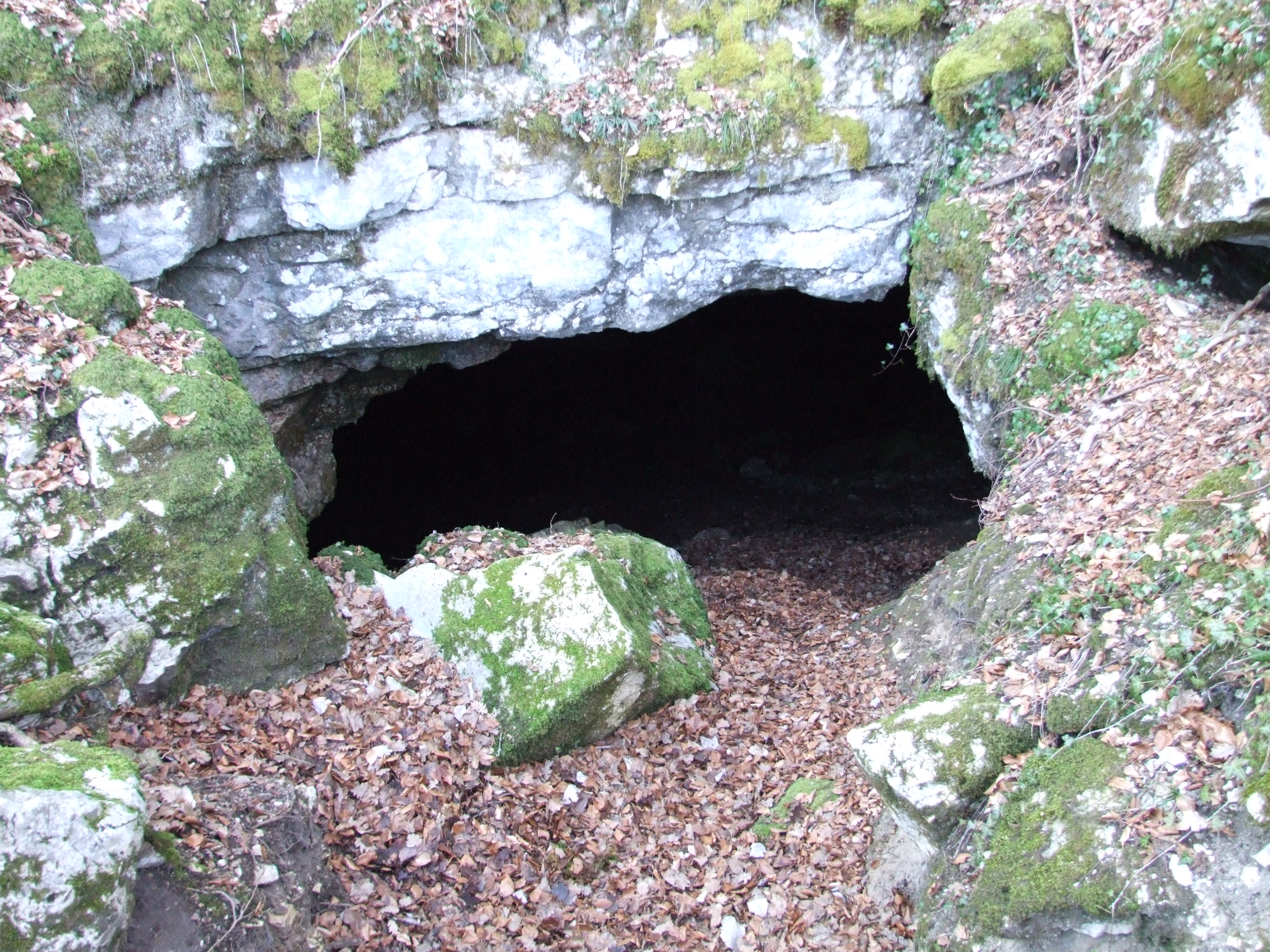 Grotte de Roche-chèvre, Barbirey-sur-Ouche, Côte-d'Or, Bourgogne, FRANCE